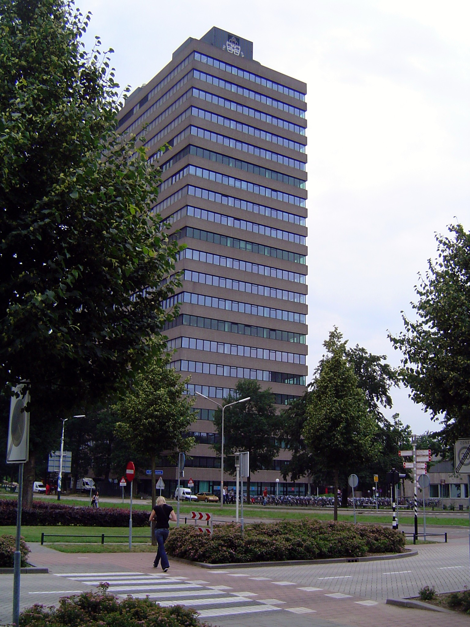 Radboud, bâtiment Erasmus (sciences naturelles)